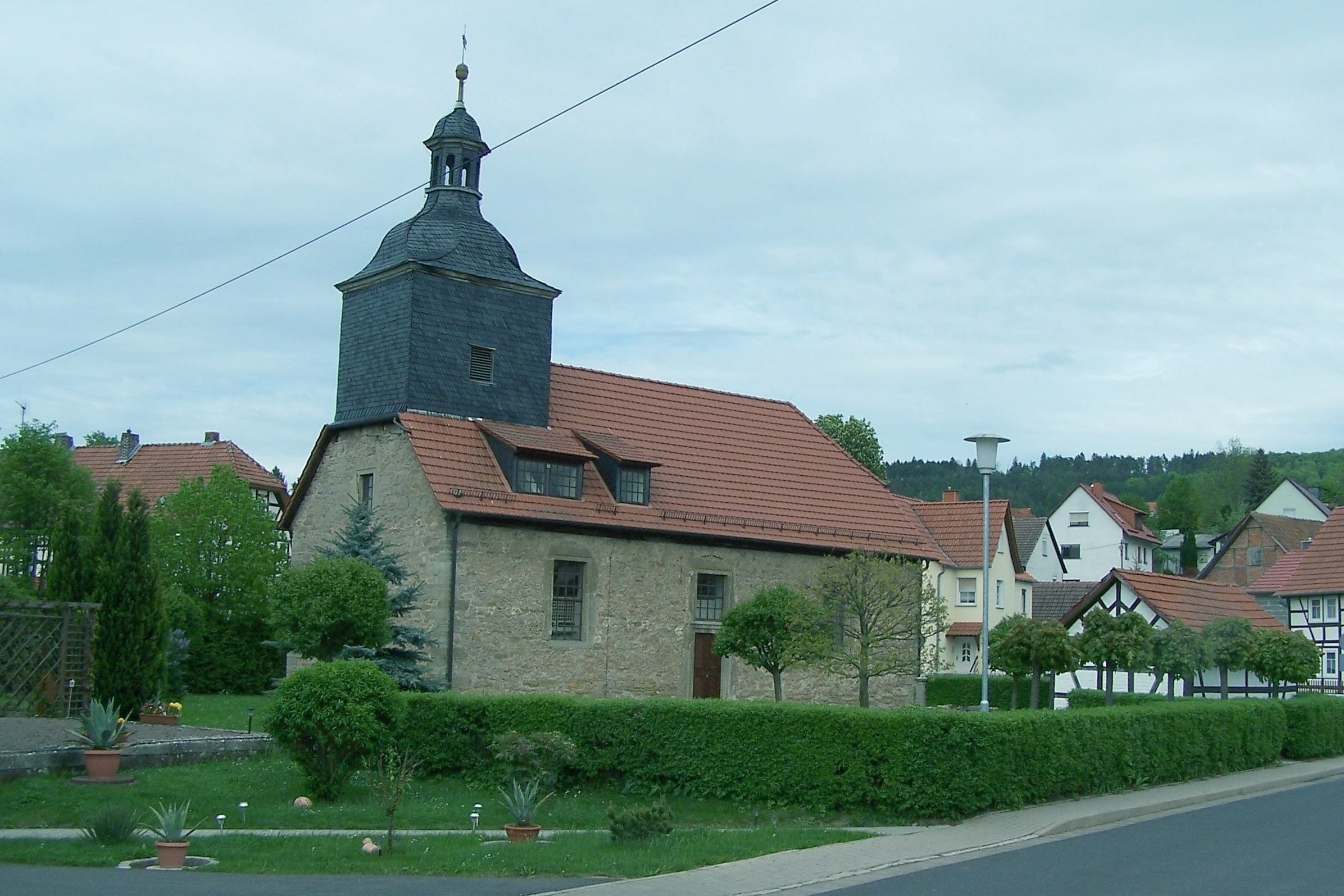 Gesamtansicht von Süden.